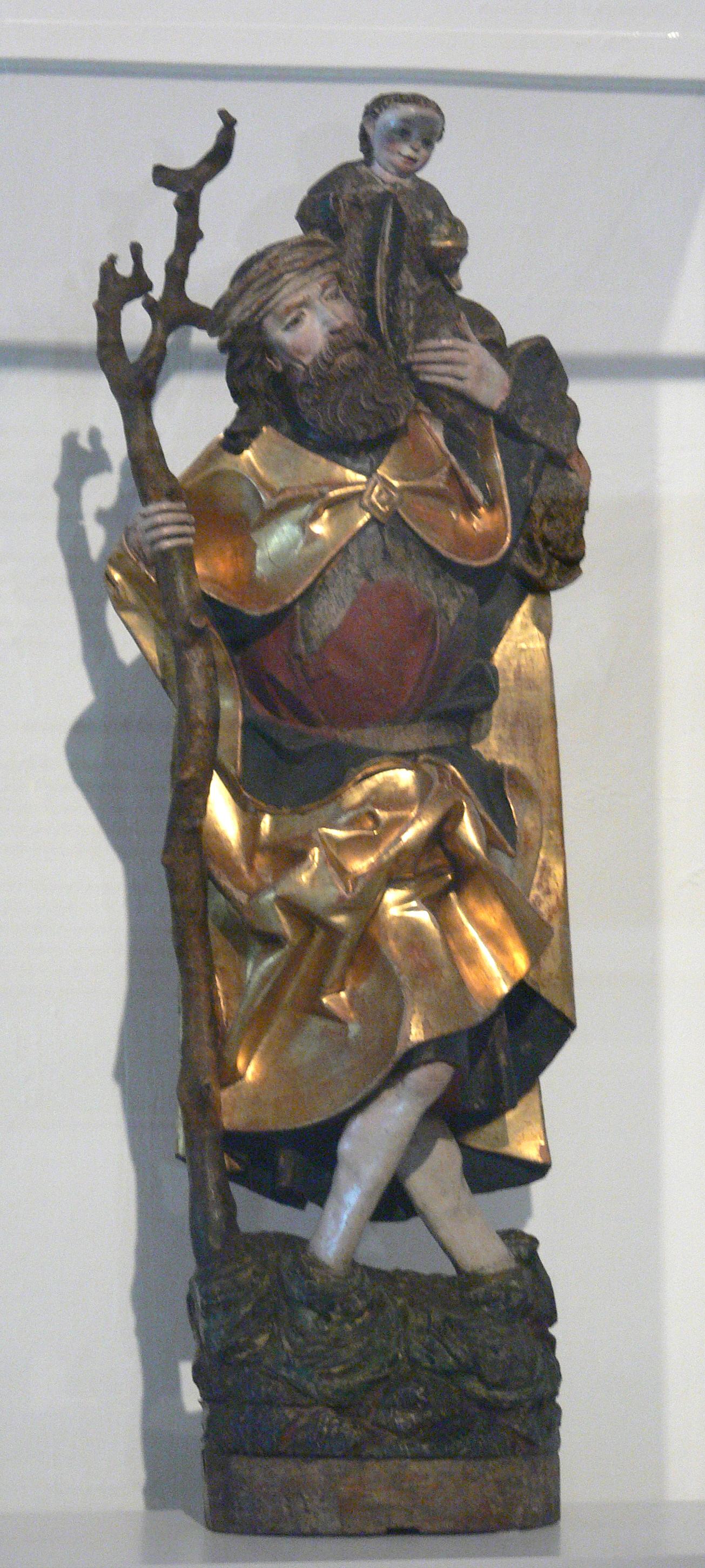 Peter Breuer: Hl. Christophorus, vom Annenaltar aus Gersdorf bei Lugau/Erzgebirge, 1506, Laubholz mit originaler Fassung Staatliche Kunstsammlungen Dresden, Skulpturensammlung, SAV 2273a1 (ausgestellt im Schloßbergmuseum Chemnitz)